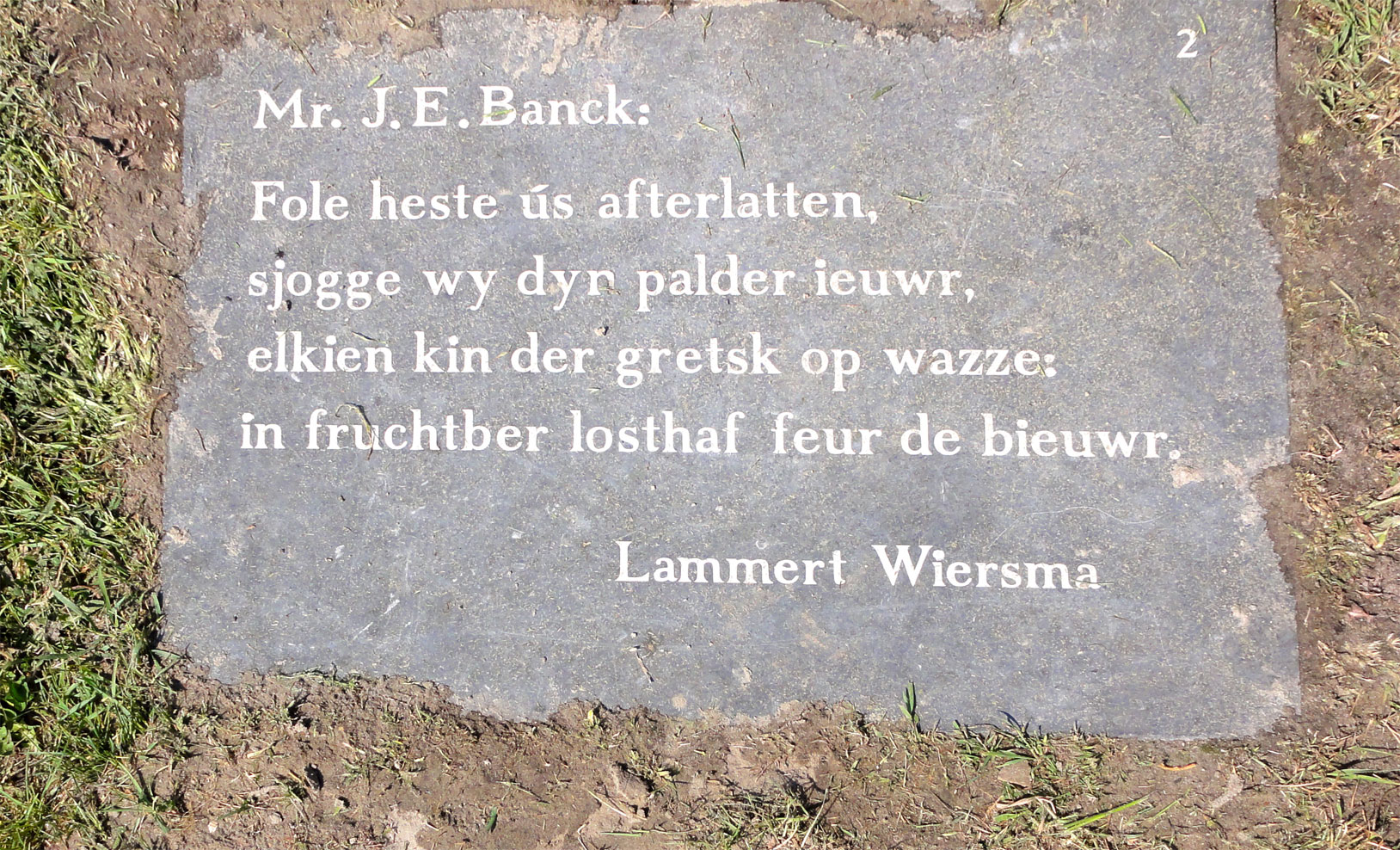 Taalroute Schiermonnikoog Mr. J.E. Banck bij de Reeweg